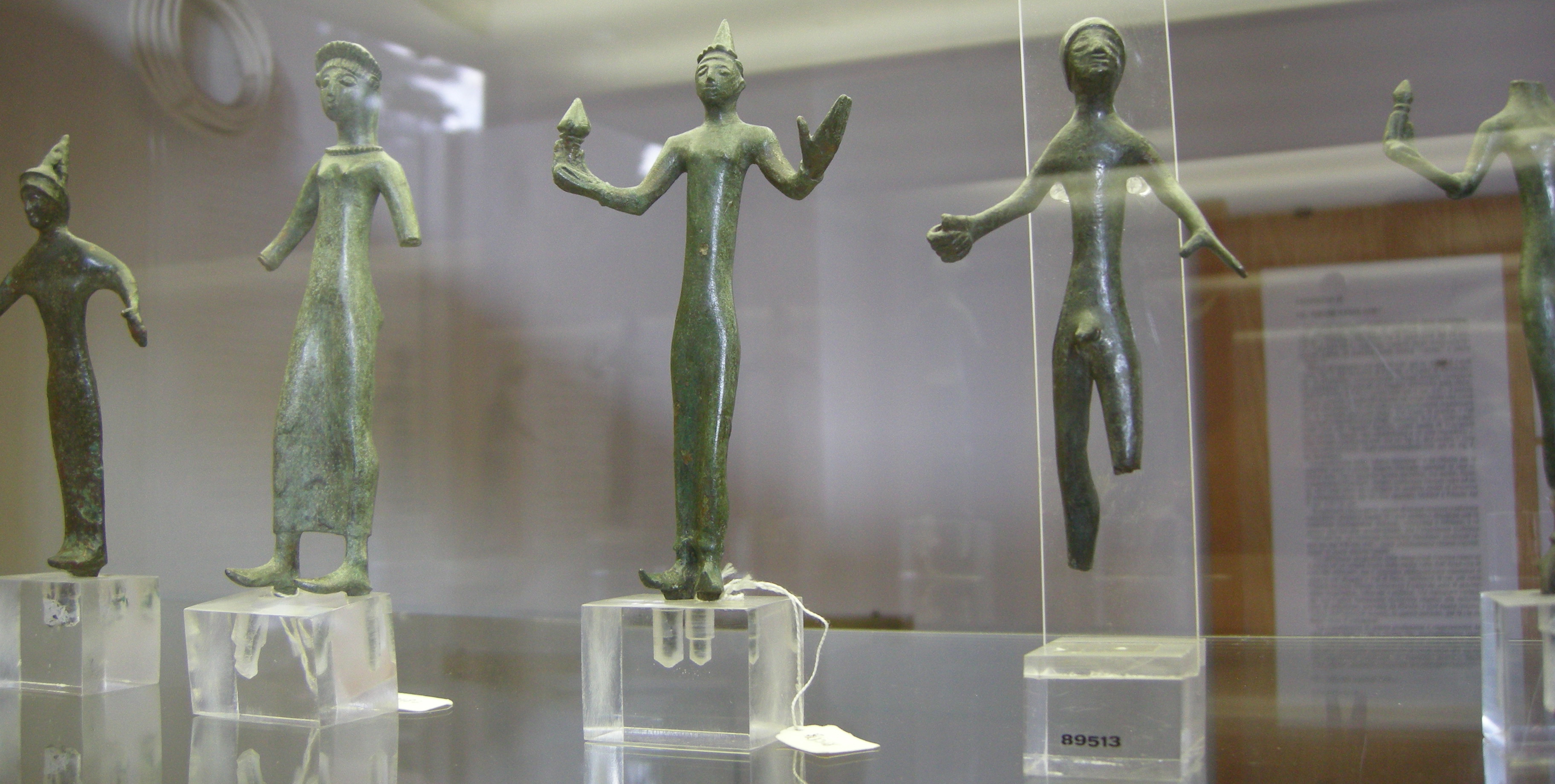 Bronzetti